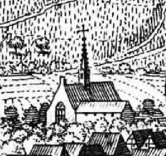 Das Karmeliterkloster in Heilbronn um 1640.